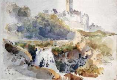 Reichenstein Blick zur Burg bei der Laufenmühle. (Aquarell)